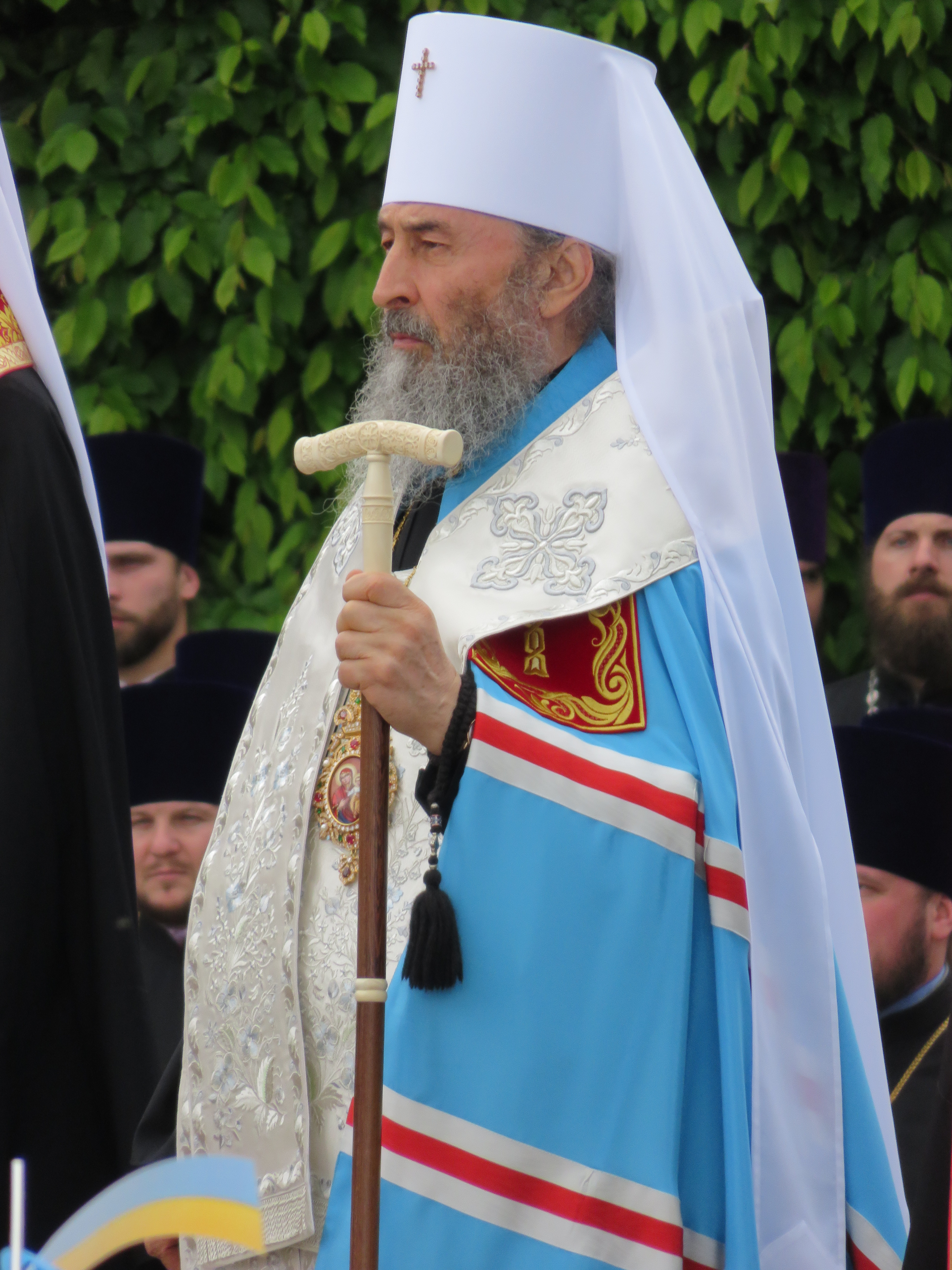 Митрополит Онуфрій (Березовський) під час молебню 8 травня 2016 у Парку Слави